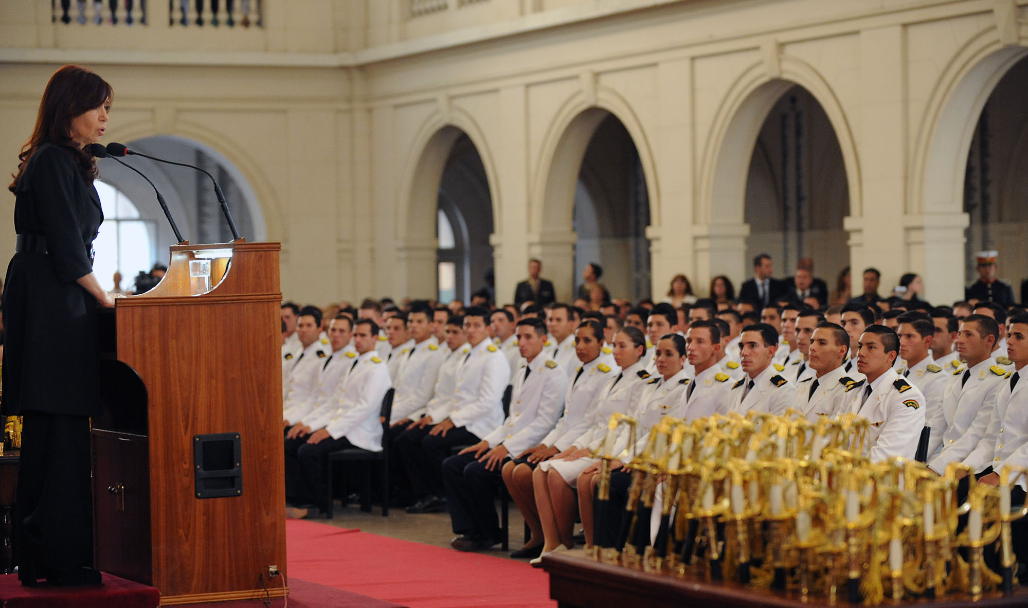 La Presidenta encabeza la ceremonia de egreso conjunto de alféreces, guardamarinas y subtenientes en el Colegio Militar de la Nación (El Palomar, Argentina).